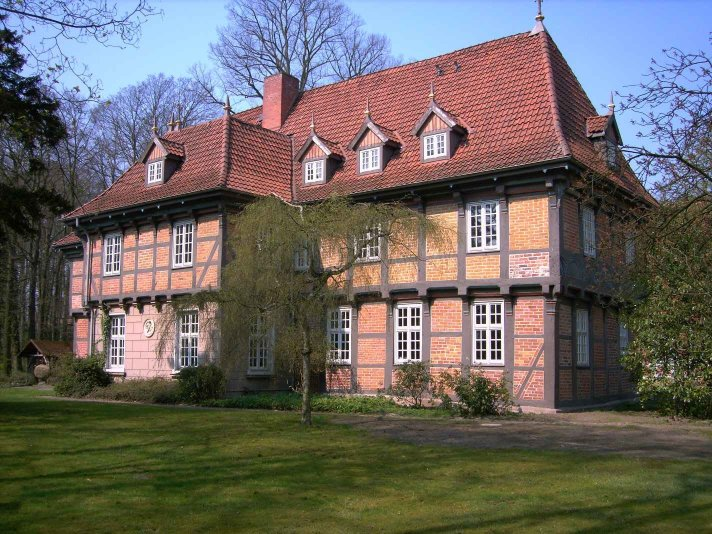 Rückseite des Haupthauses vom Gut Sandbeck in Osterholz-Scharmbeck. Photographiert im April 2005.